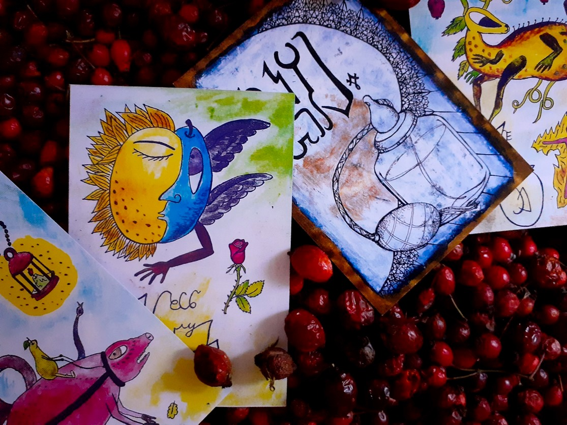 Світлина карток із формулами, що створили Анна Амарго і Олесь Барліг до Осіннього рівнодення